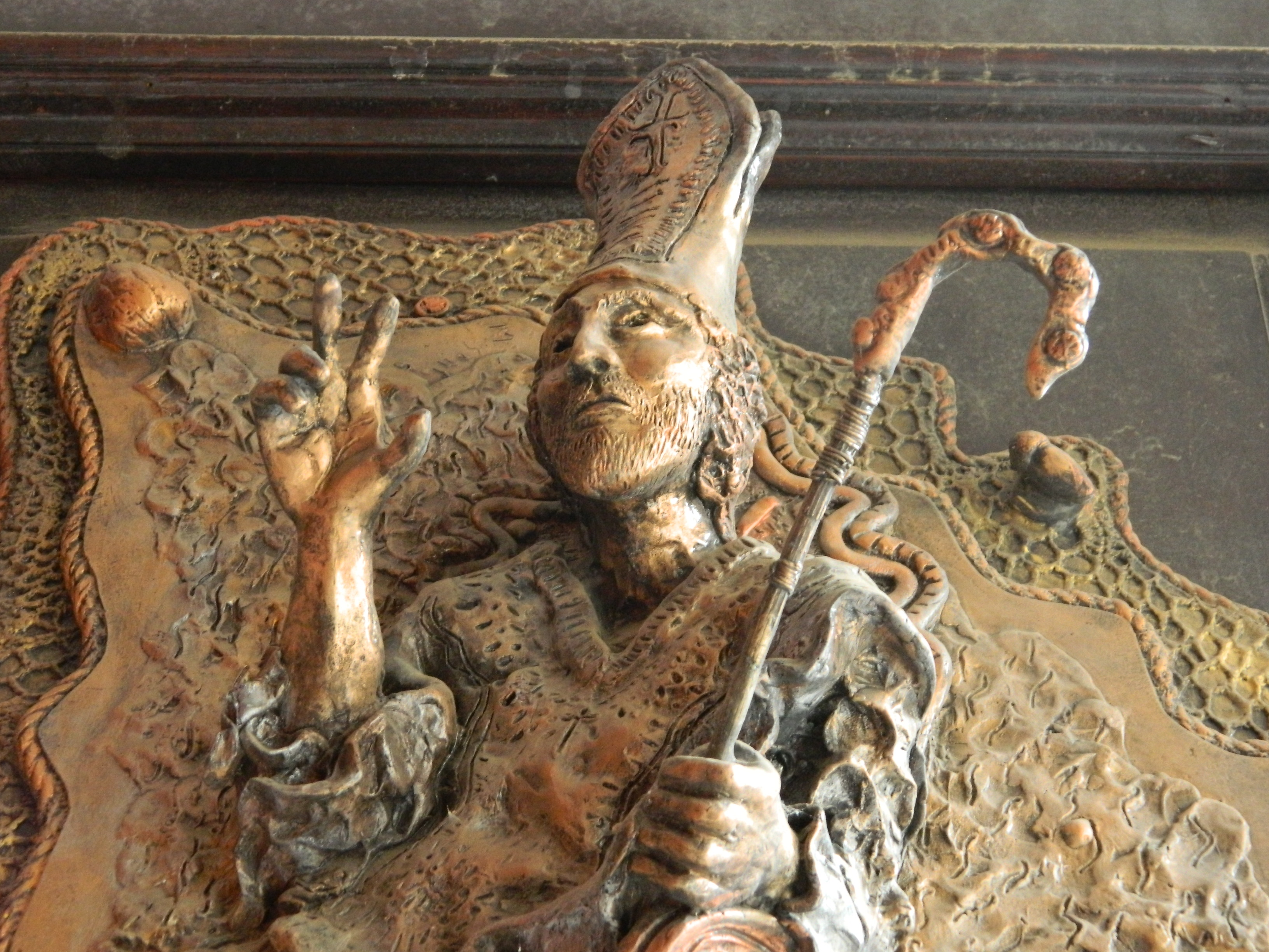 Cattedrale di San Gerardo (Potenza) - Particolare di San Gerardo sul portone d'ingresso